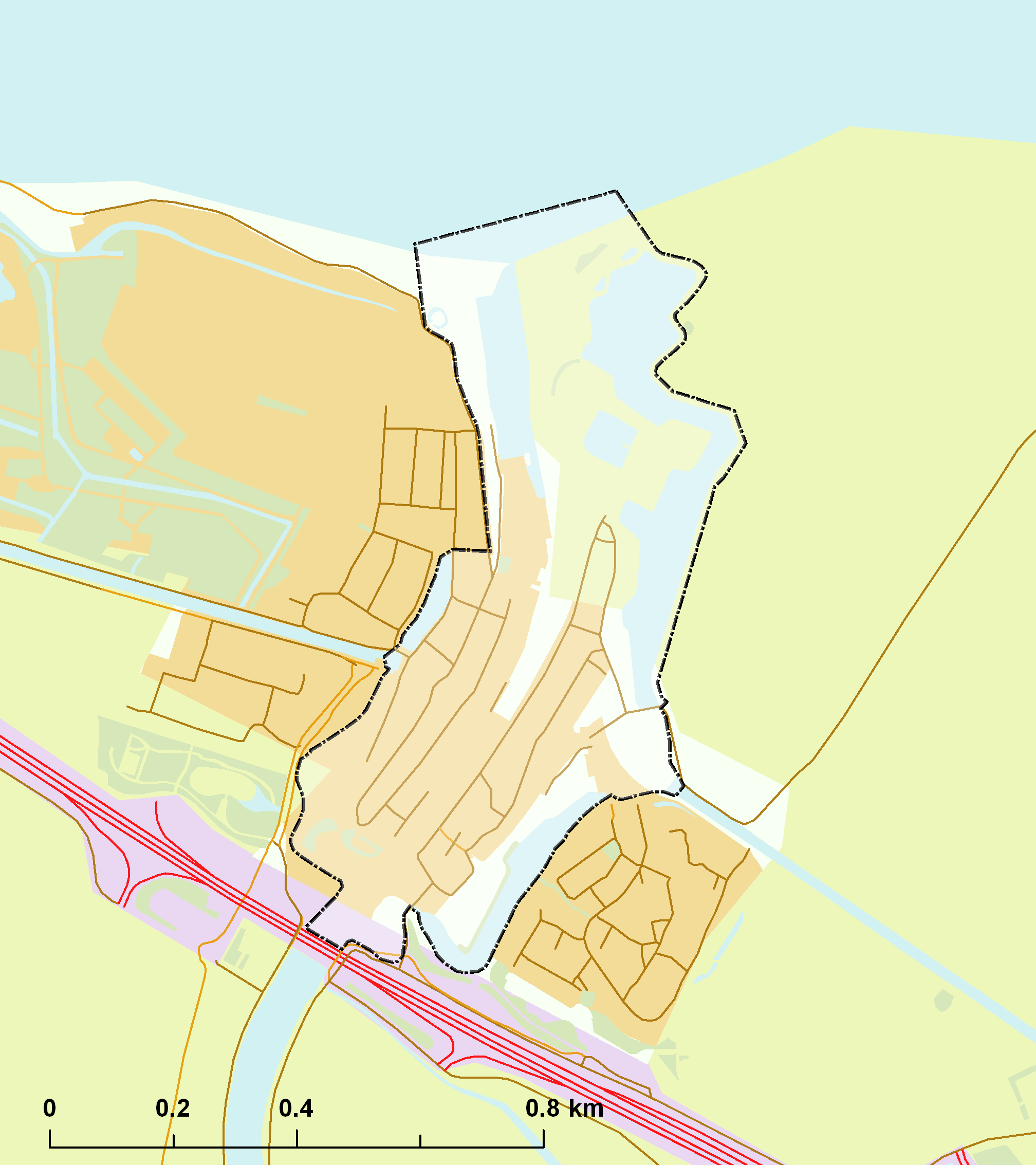 Rijksbeschermd stads- of dorpsgezicht - Muiden.png